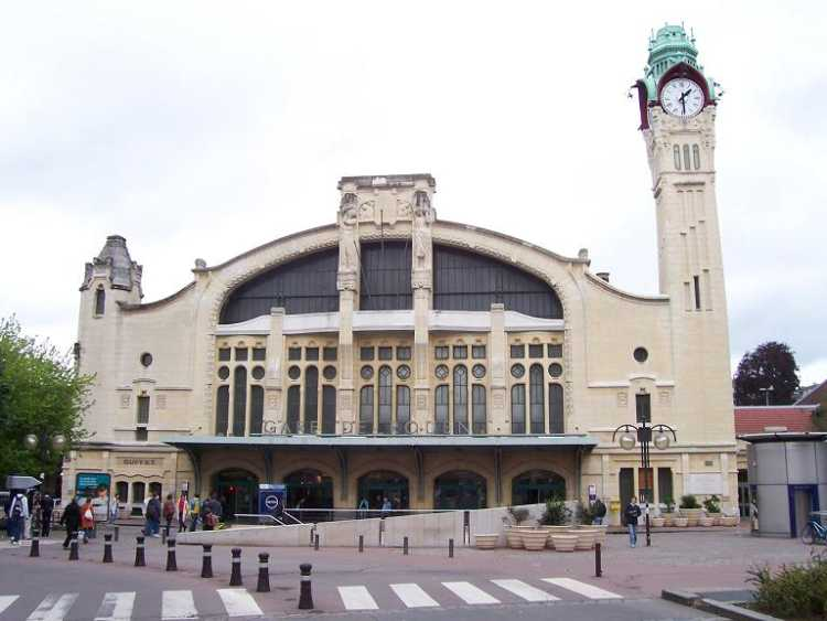 Gare de Rouen